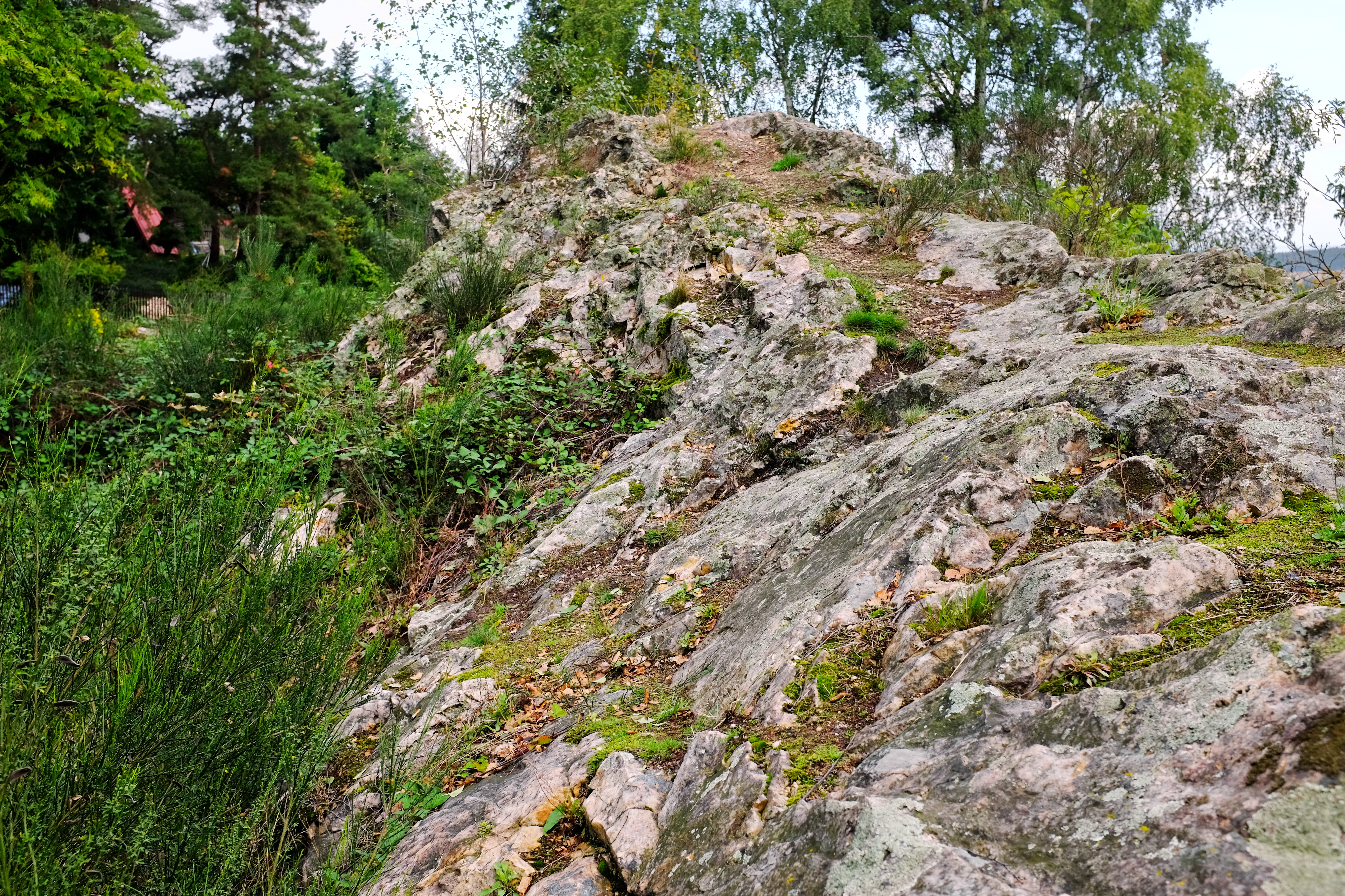 Přírodní památka Chodovské skály u Chodova u Domažlic, Český les